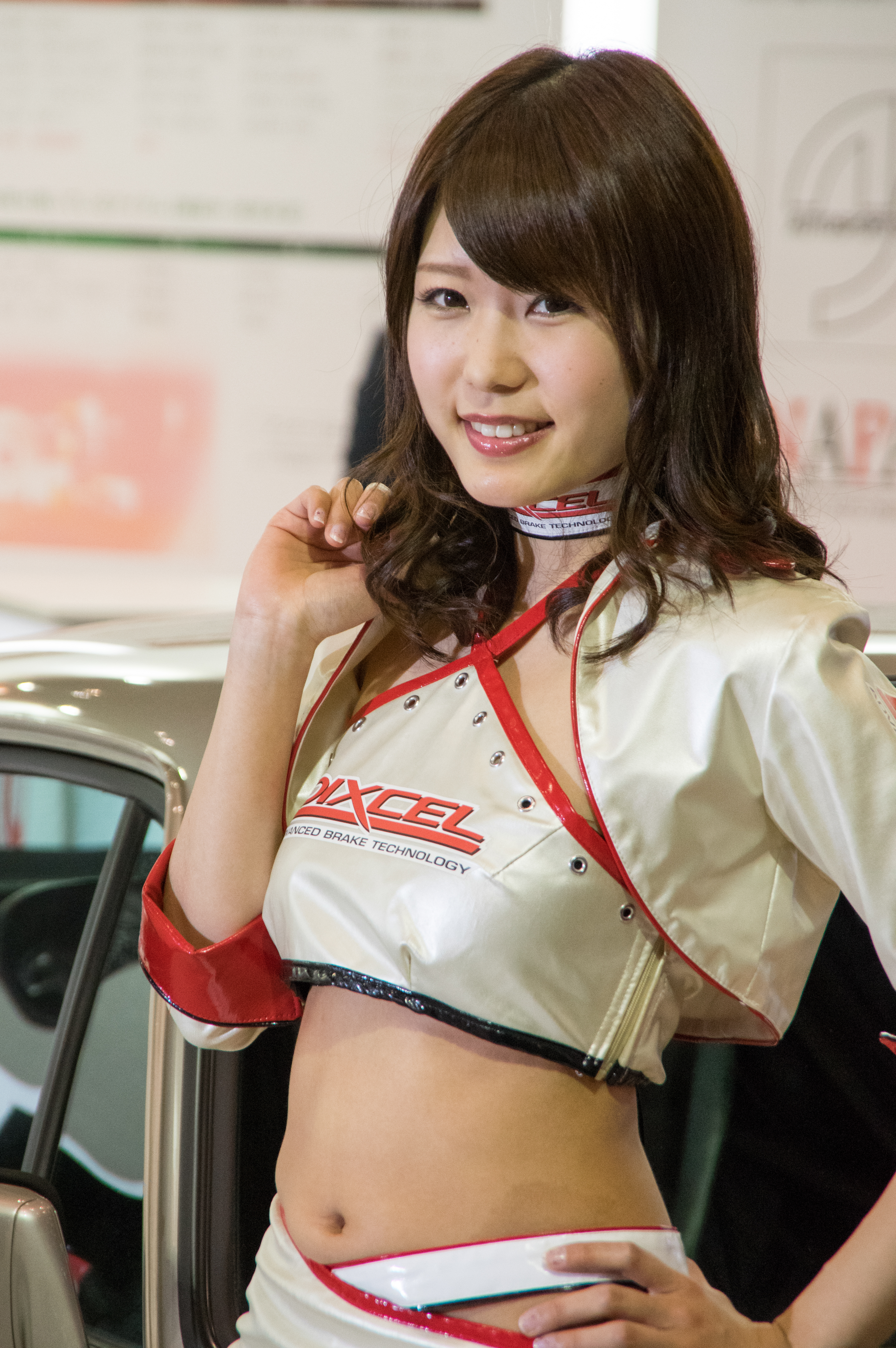 TOKYO AUTO SALON 2017 （東京オートサロン2017）-153.jpg